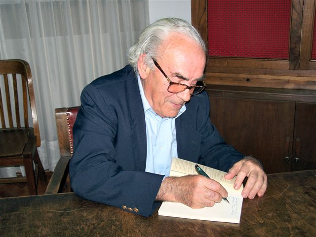 António Cabral em sessão de autógrafos, após o lançamento do livro O rio que perdeu as margens, Vila Real, 4 de Junho de 2007.